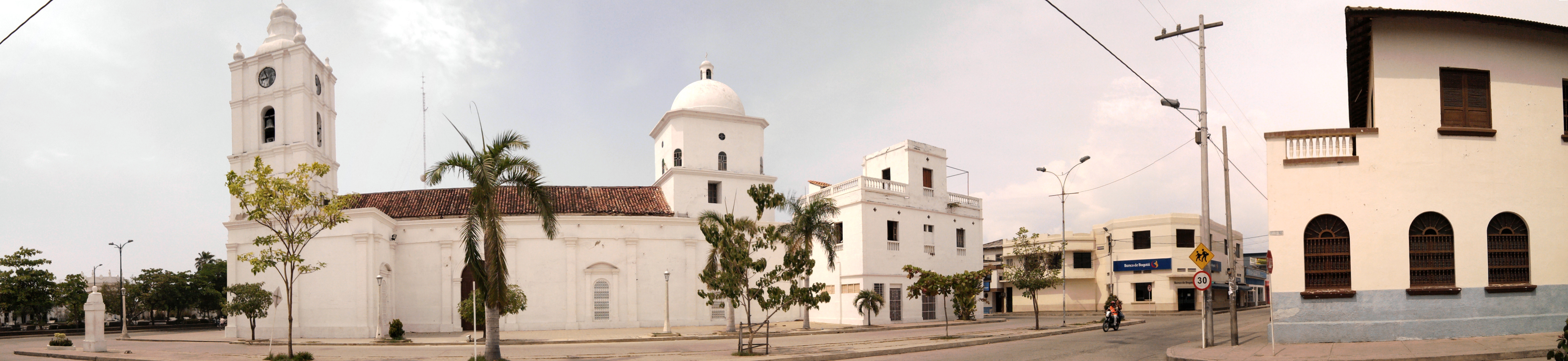 Foto Panoramica De la Iglesia de Cienaga, Magdalena, Colombia que esta ubicada en la Plaza del Centenario de dicho lugar.